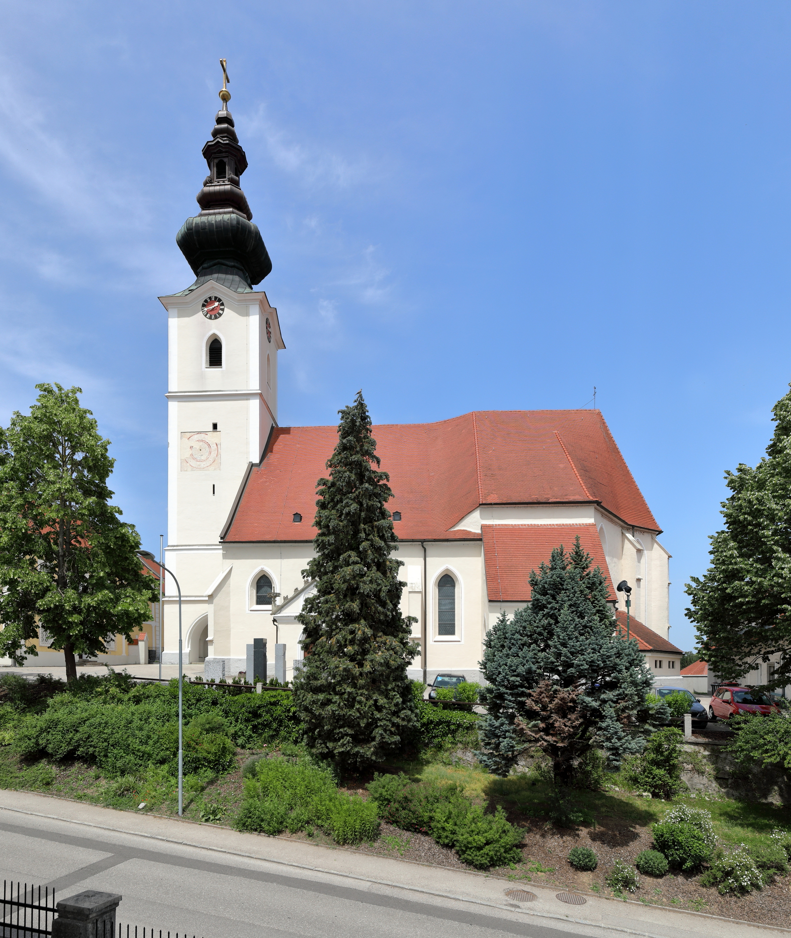 Südansicht der röm.-kath. Pfarrkirche hl. Martin in der niederösterreichischen Marktgemeinde Aschbach-Markt. Eine spätgotische Staffelkirche aus dem 15./16. Jahrhundert, wobei der vorgestellte Westturm 1833 erhöht wurde und eine vierfache Zwiebelhaube mit Laterne erhielt.